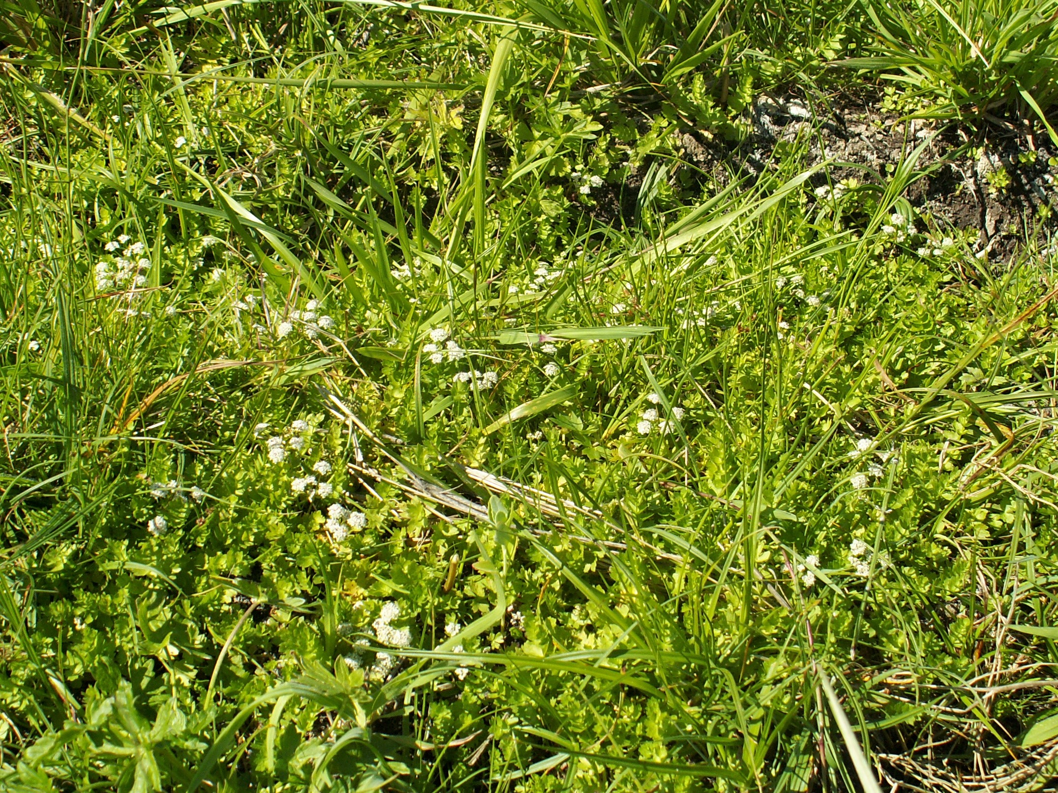 Apium repens in Wierzbno on Miedwie Lake, NW Poland